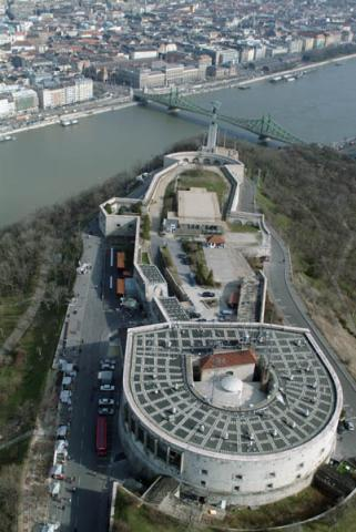 Citadella, Budapest, Hungary, aerialphotography